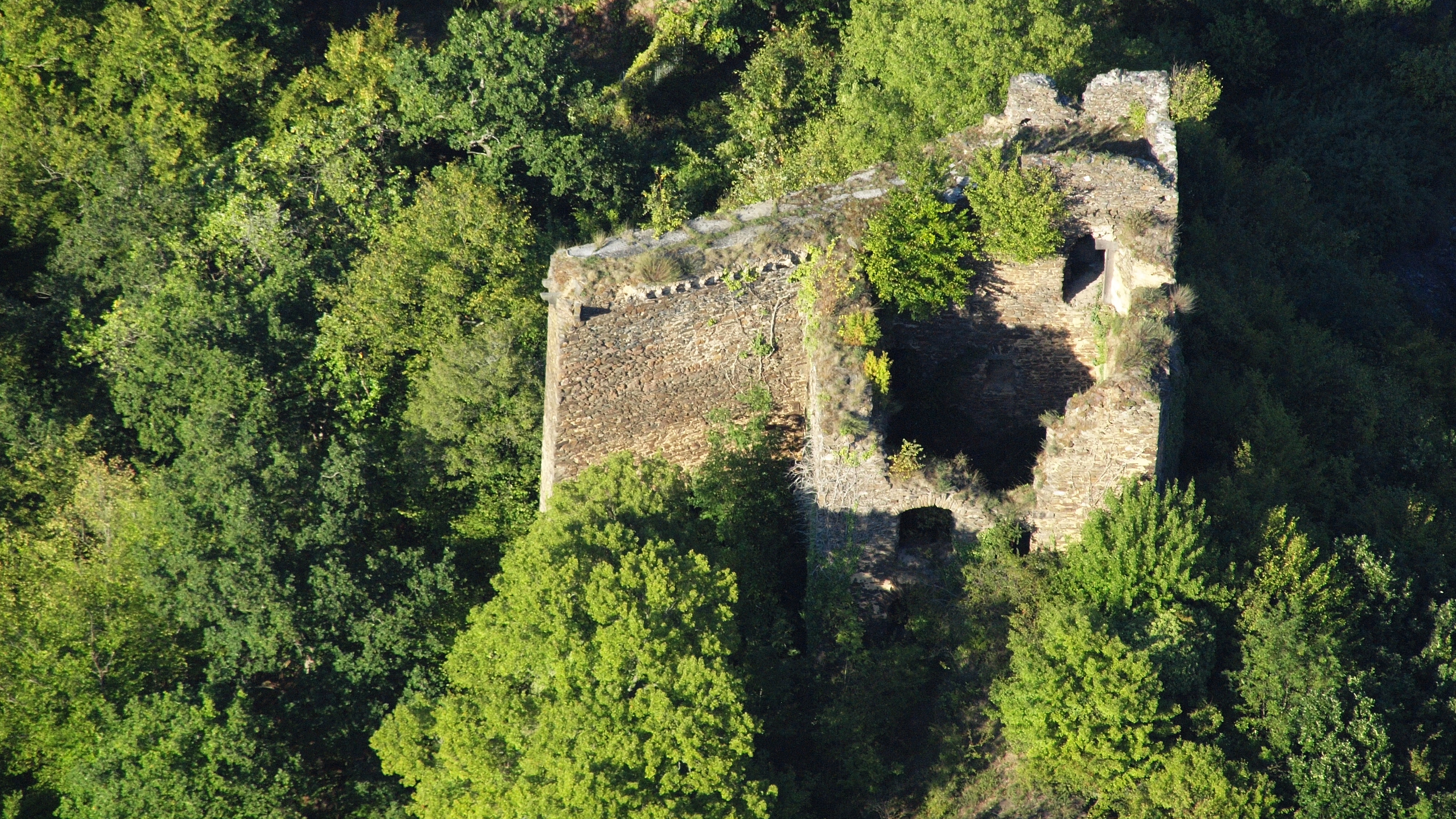 Burg Trutzeltz, Luftaufnahme (2015)